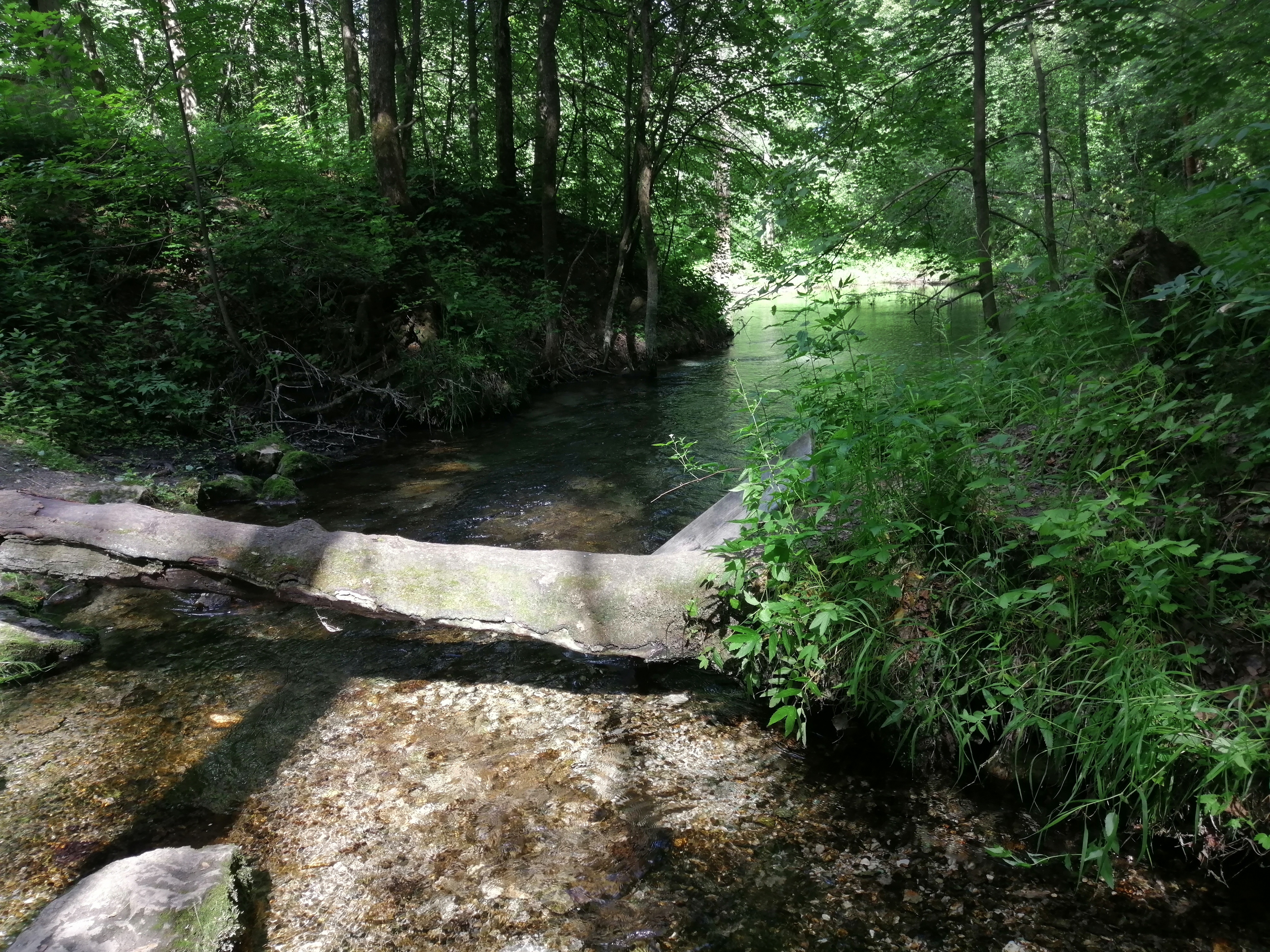 Зеленый ключ